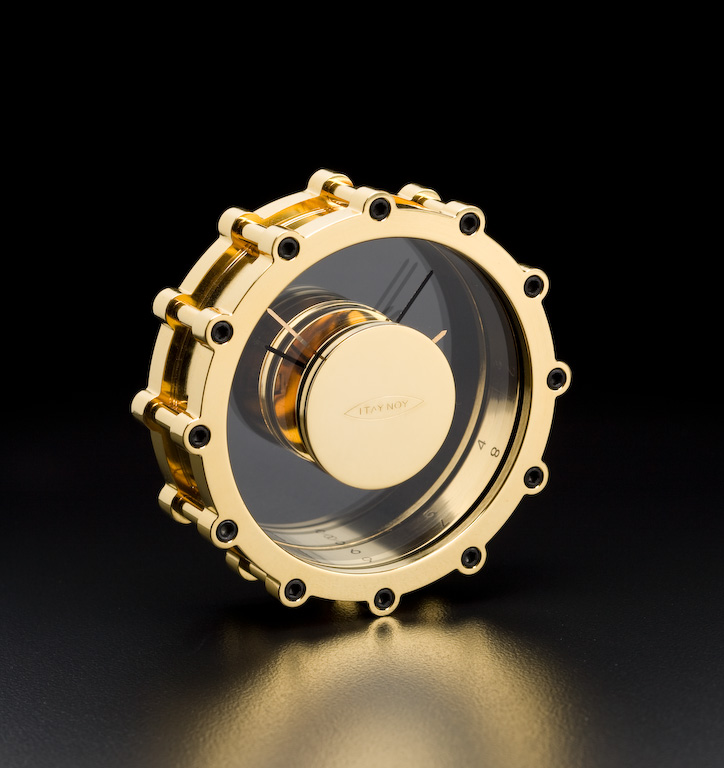 יצירה של איתי נוי